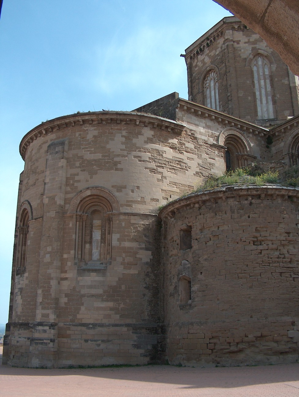 Sé Velha de Lérida. Sé Velha de Lérida em Espanha.